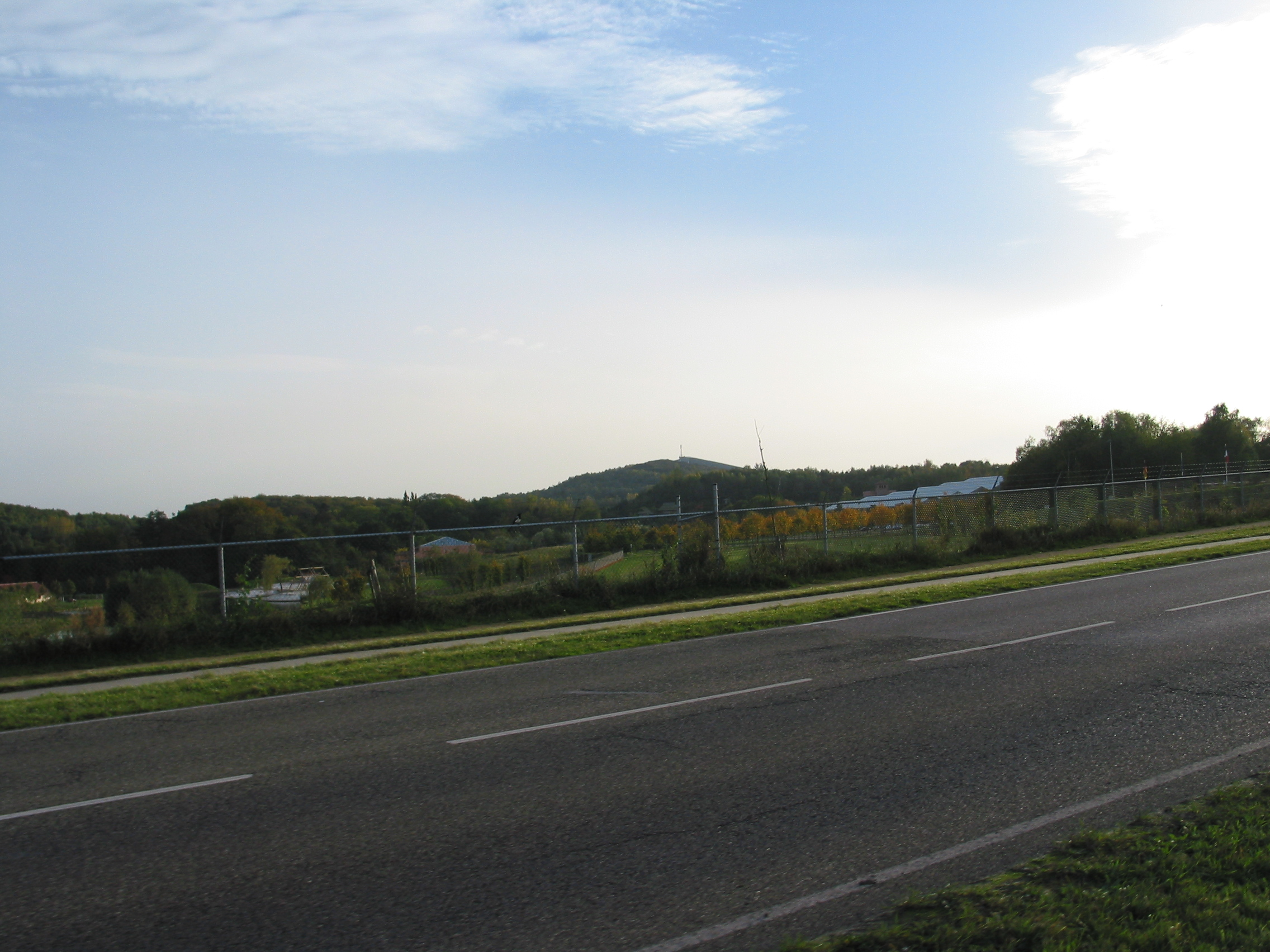 Mondo Verde rechts op de foto met de Wilhelminaberg op de achtergrond.